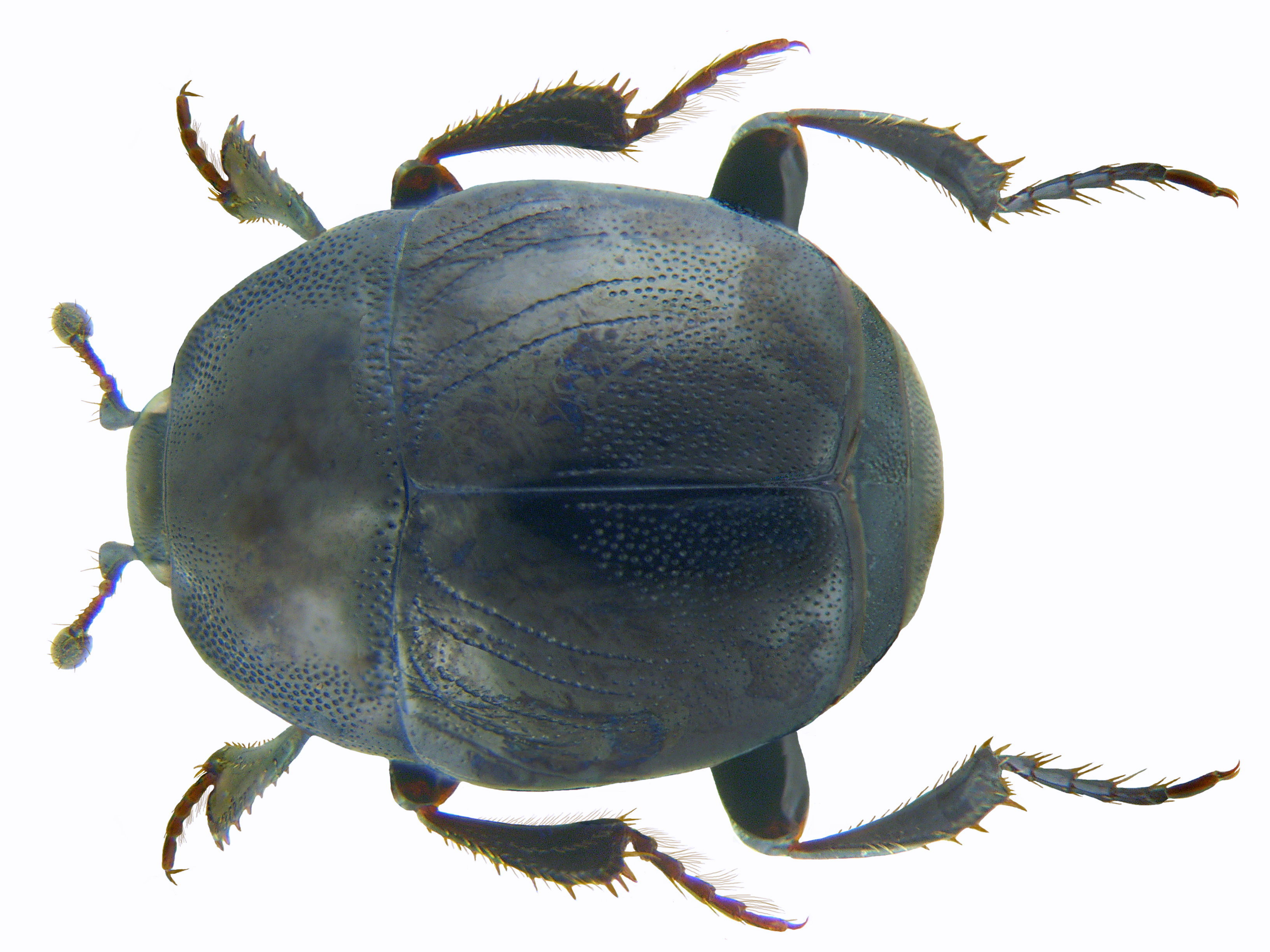 Familie: Histeridae Grösse: 3,5-5,5 mm Verbreitung: Europa Ökologie: besonders an Aas Fundort: Germania, Bayern, Oberfranken, Kulmbach